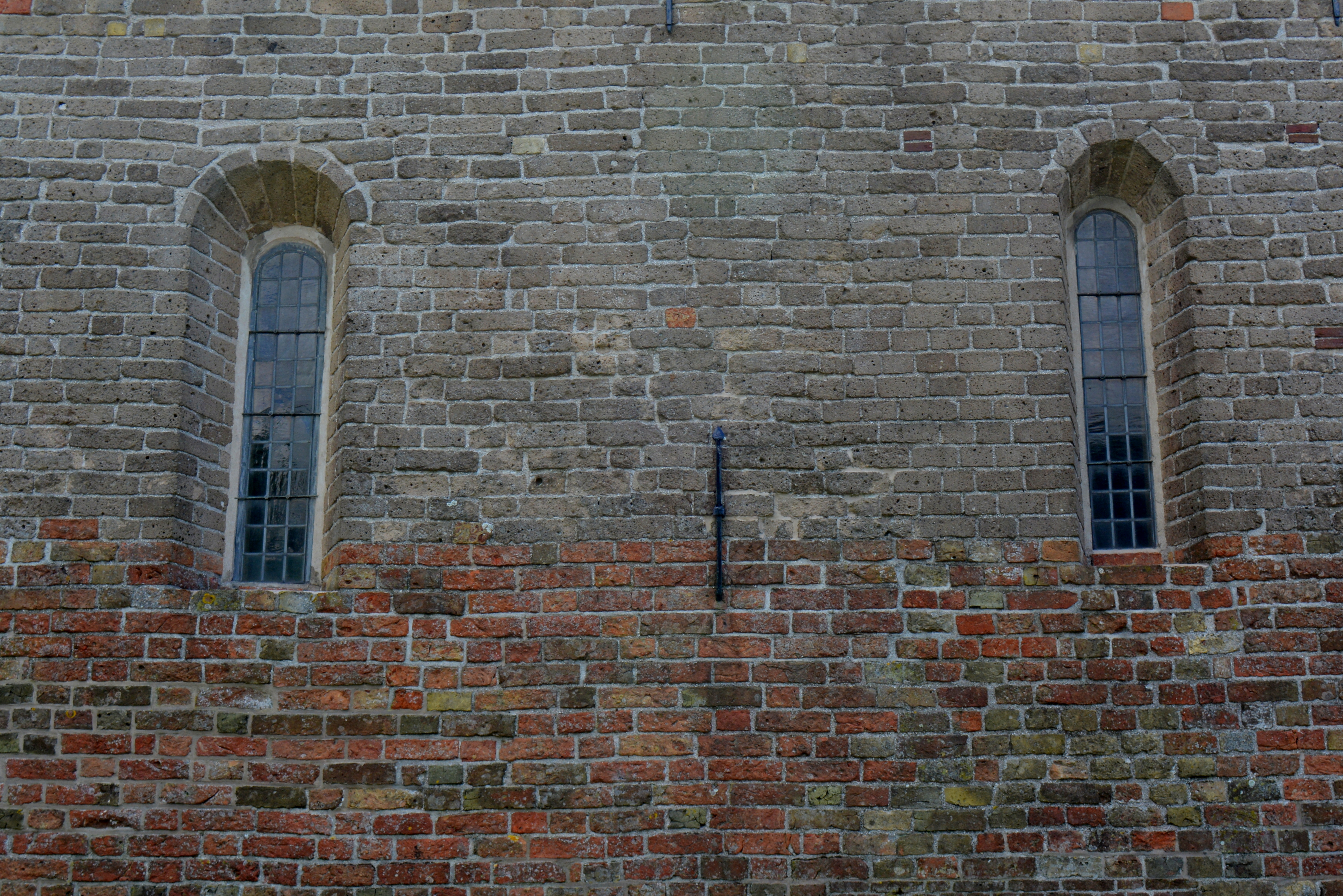 Deinum. Johannes de Doperkerk, romaanse ramen